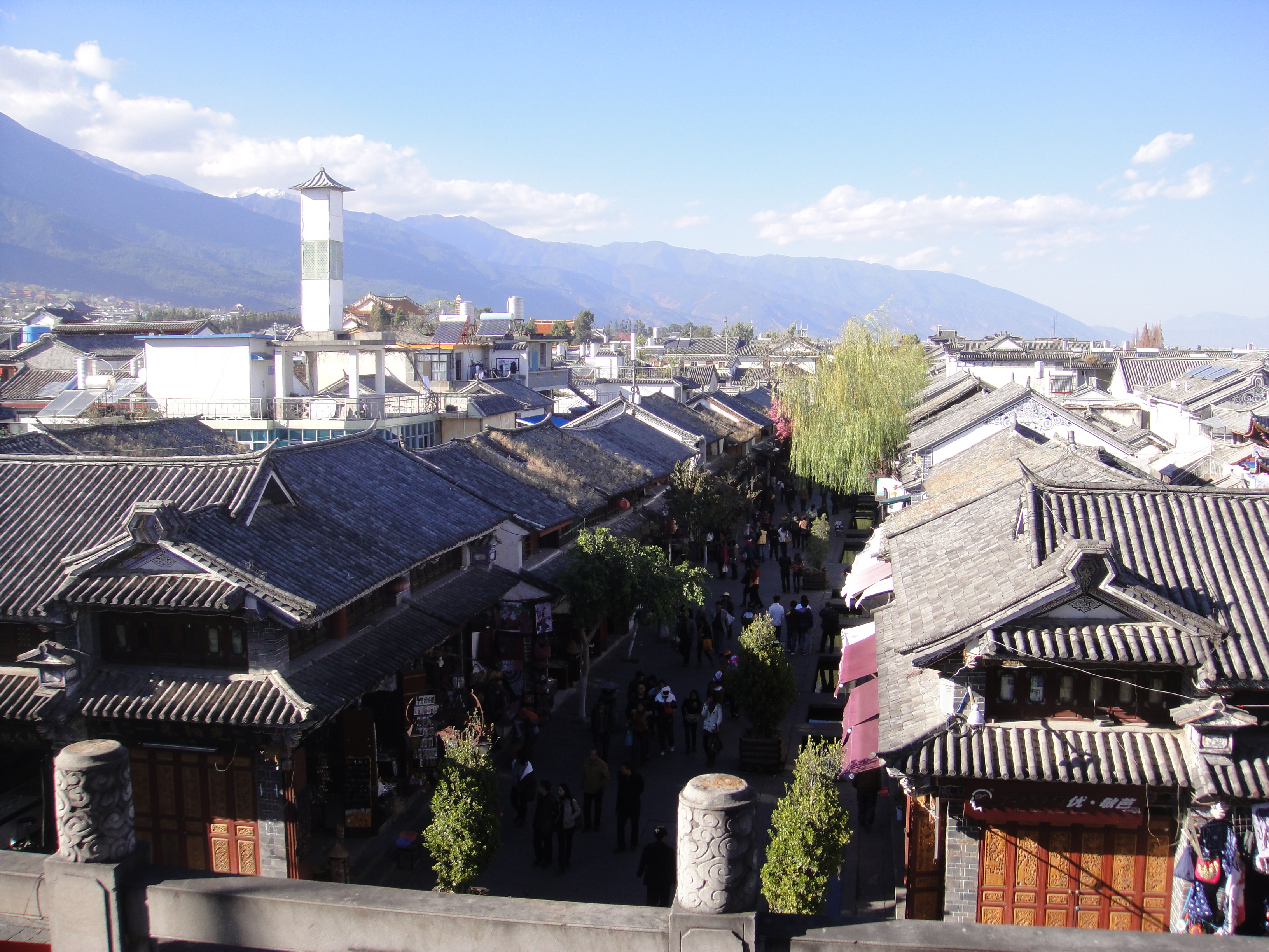 大理古城